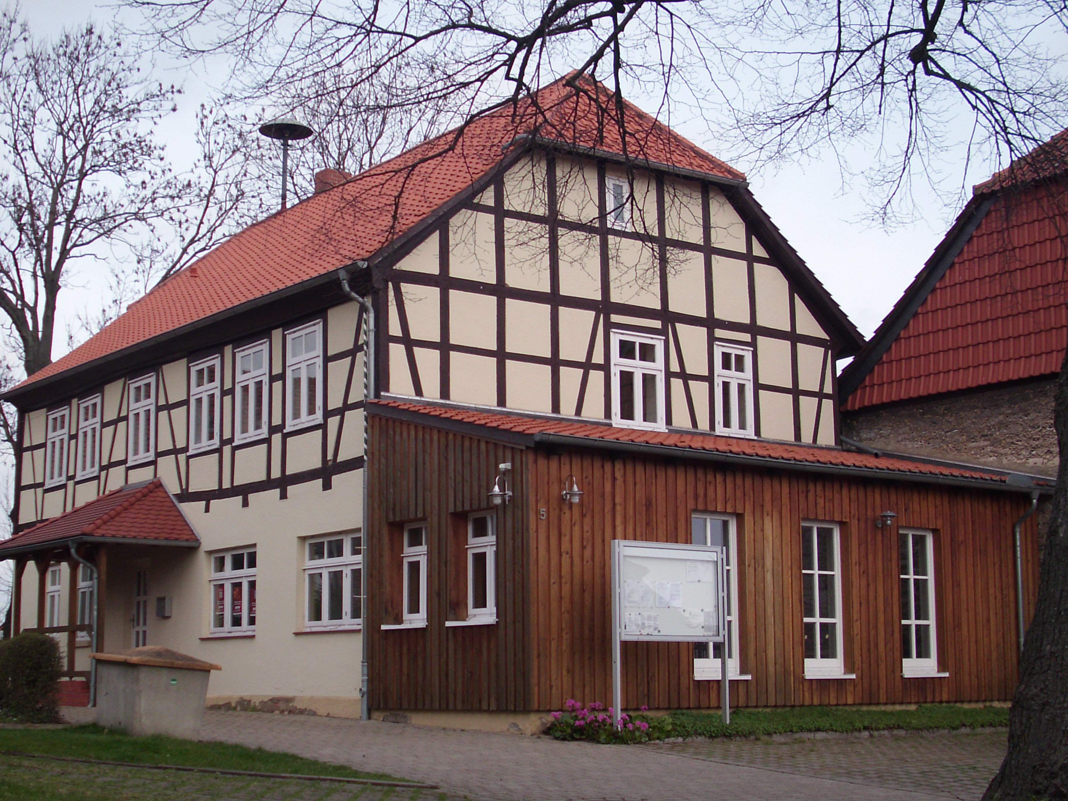 AlteSchule in Sunstedt